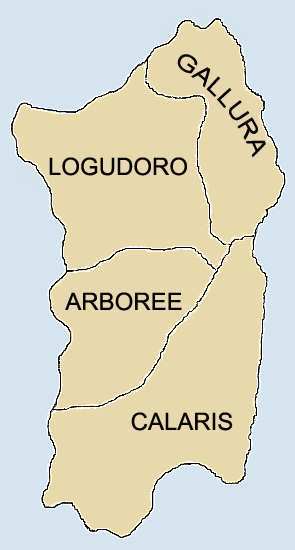 auteur:user:Yugiz Cette image représente les quatre Judicats de Sardaigne.